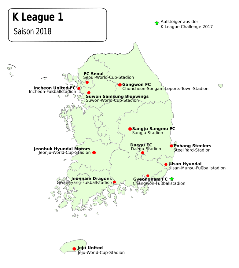 K League 1 Spielorte